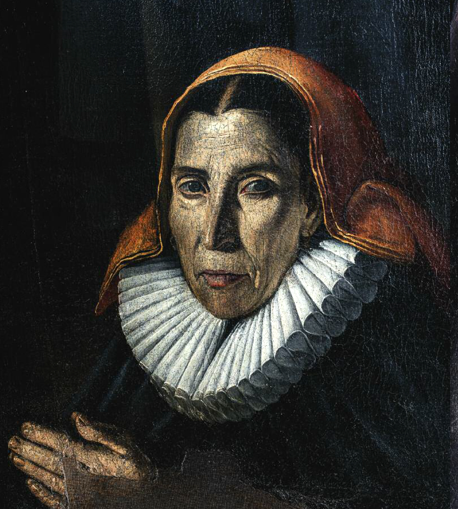 Ritratto di donatrice, dettaglio della Madonna dell'incendio sedato